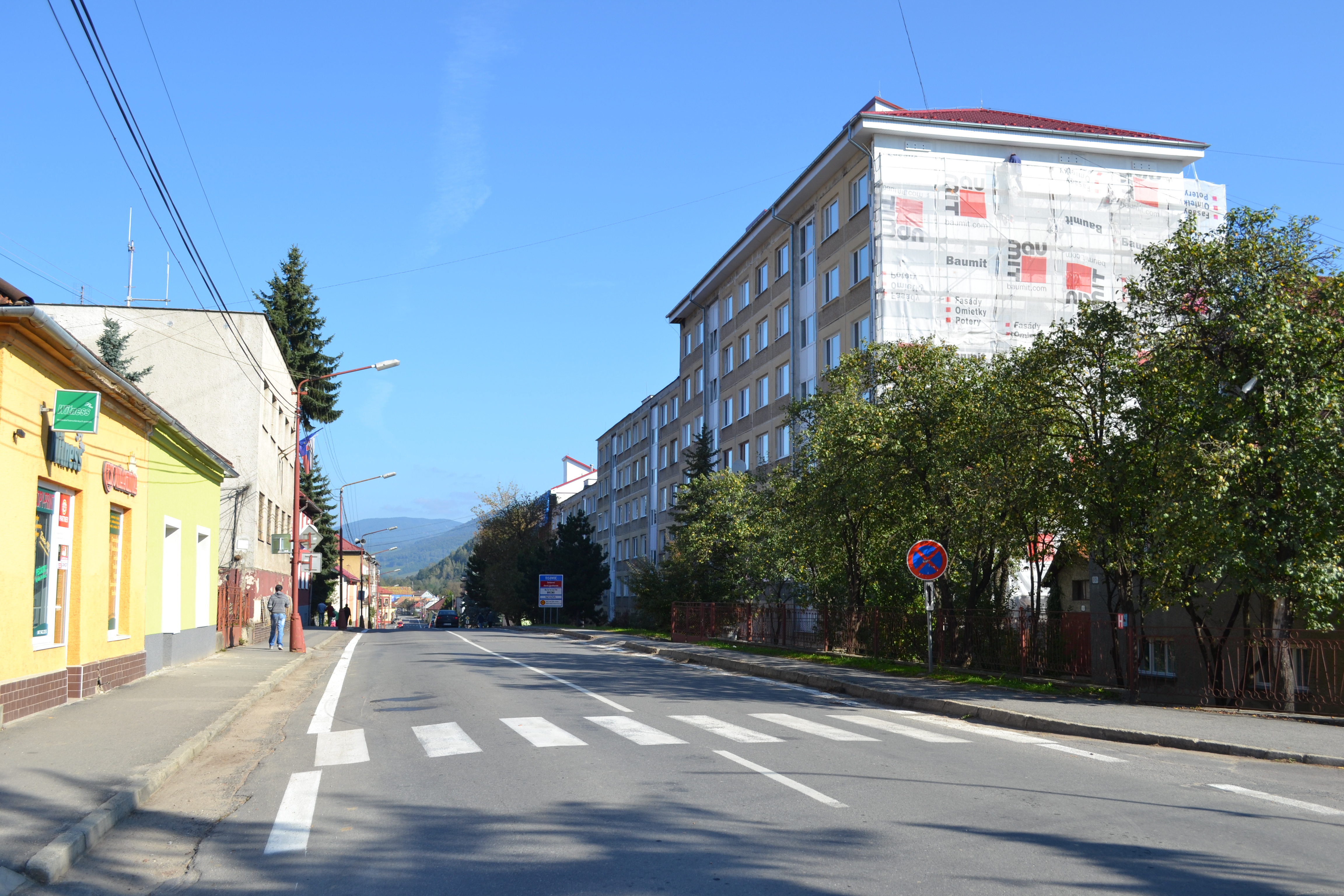 Hlavná ulica Hnúšte